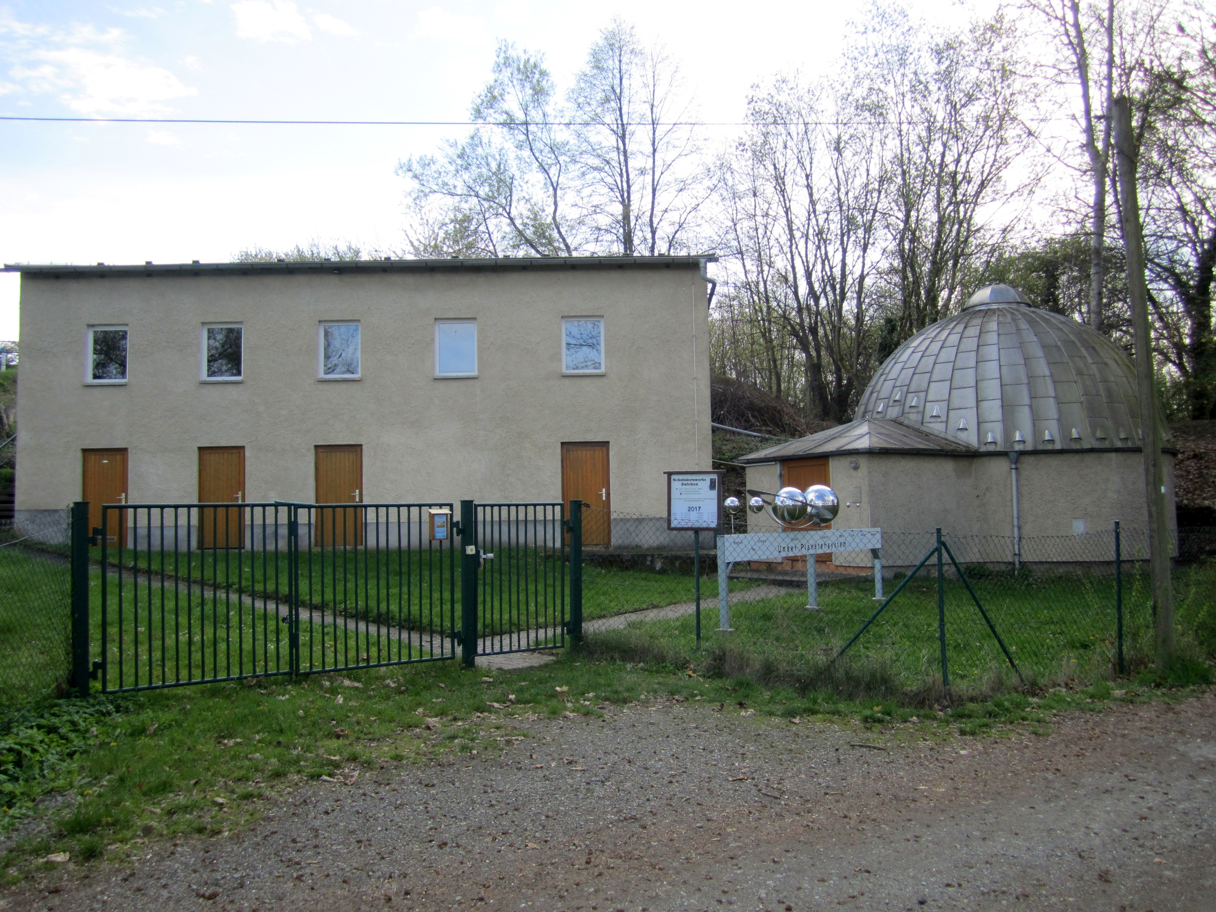 Schulsternwarte am Kreuzberg, Unterrichtsgebäude mit Planetarium. Oberplanitz/Zwickau, Sachsen, Deutschland.